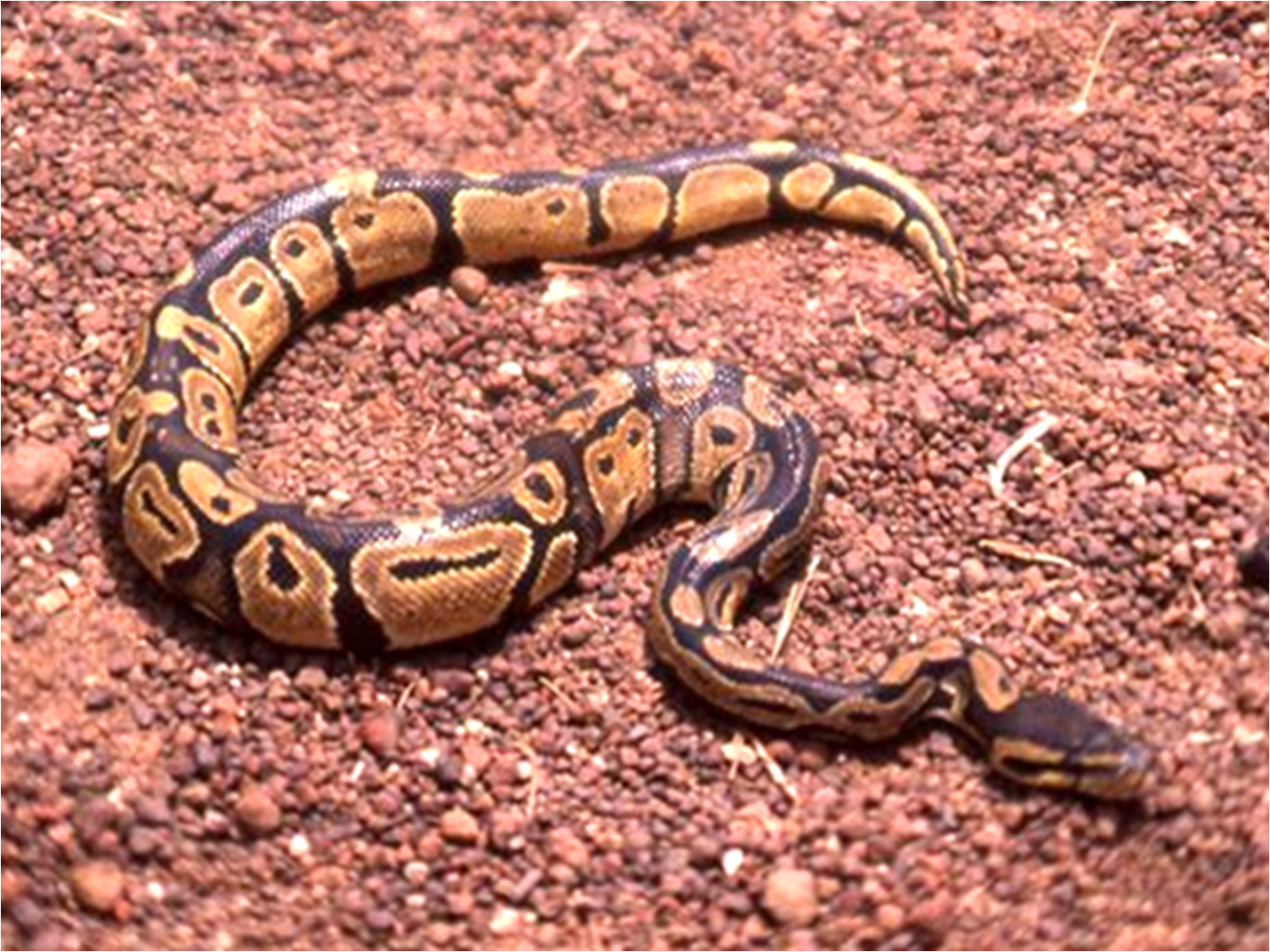 python royal